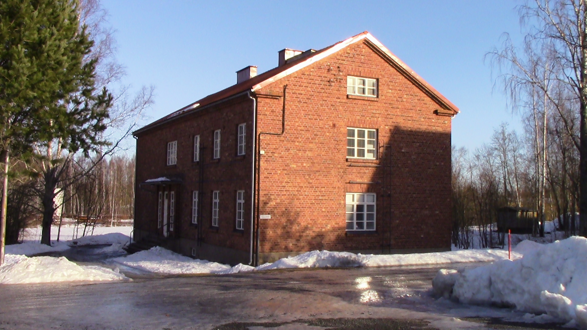 Villilän kartanon majoitusrakennus Nakkilassa. Nykyään kyseisessä rakennuksessa toimii hotellin majoitustilat.